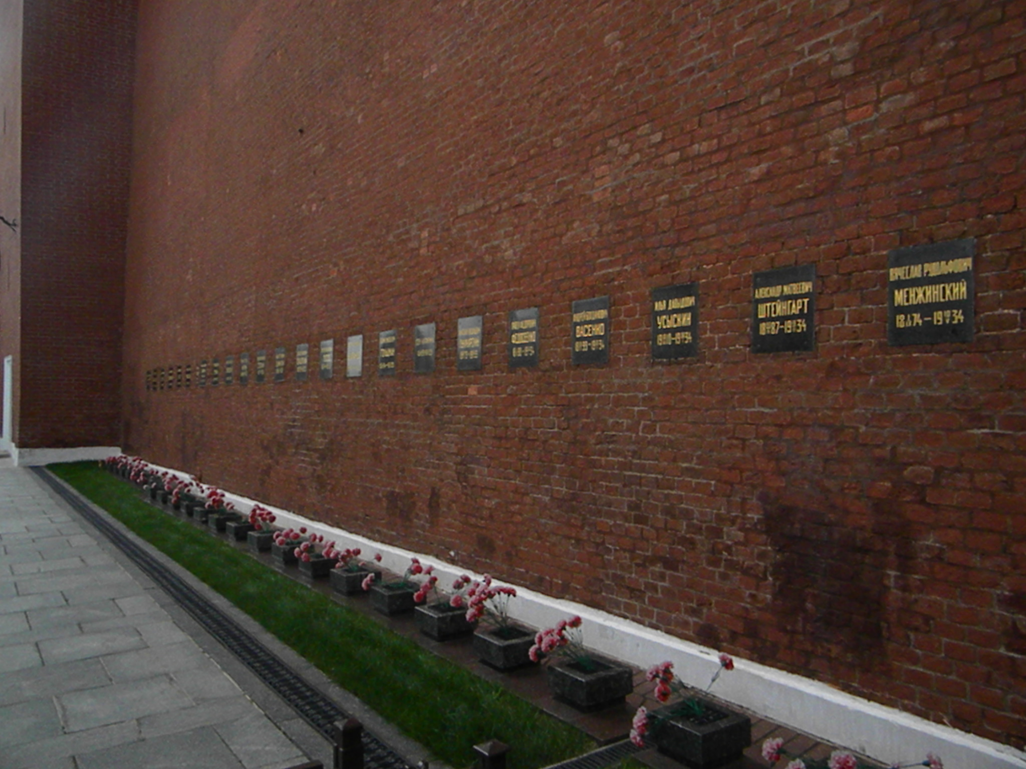 Kremlin Wall Necropolis